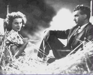 Gino Cervi e Adriana Benetti in Quattro passi fra le nuvole (1942)